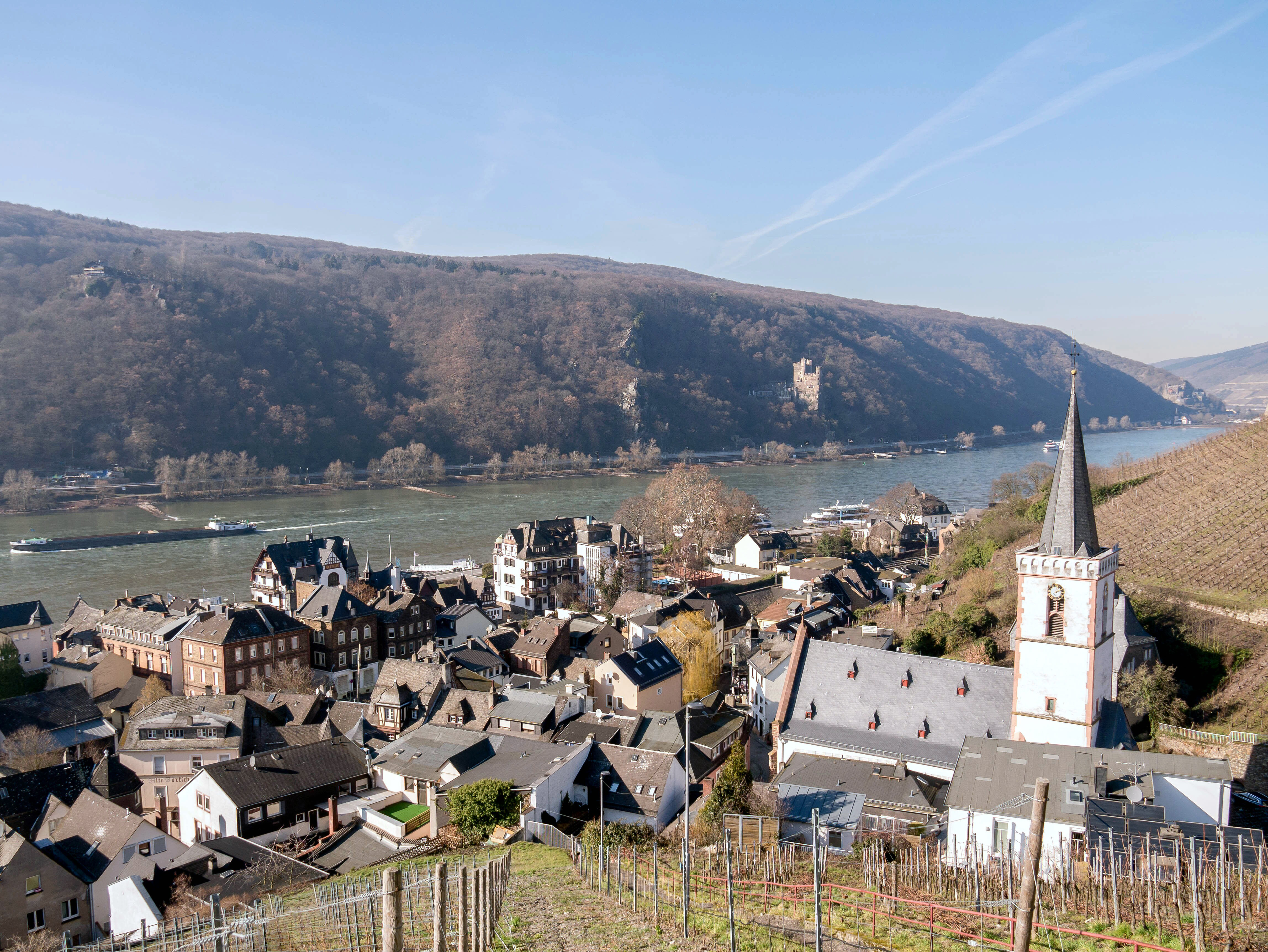 Blick über den Ort über den Rhein, links die katholische Pfarrkirche Heilig Kreuz